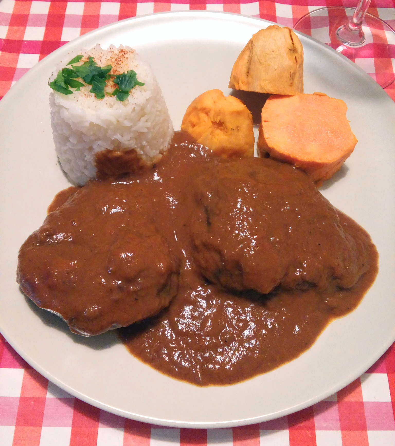 Plato de carrilleras al vino, con arroz y camote